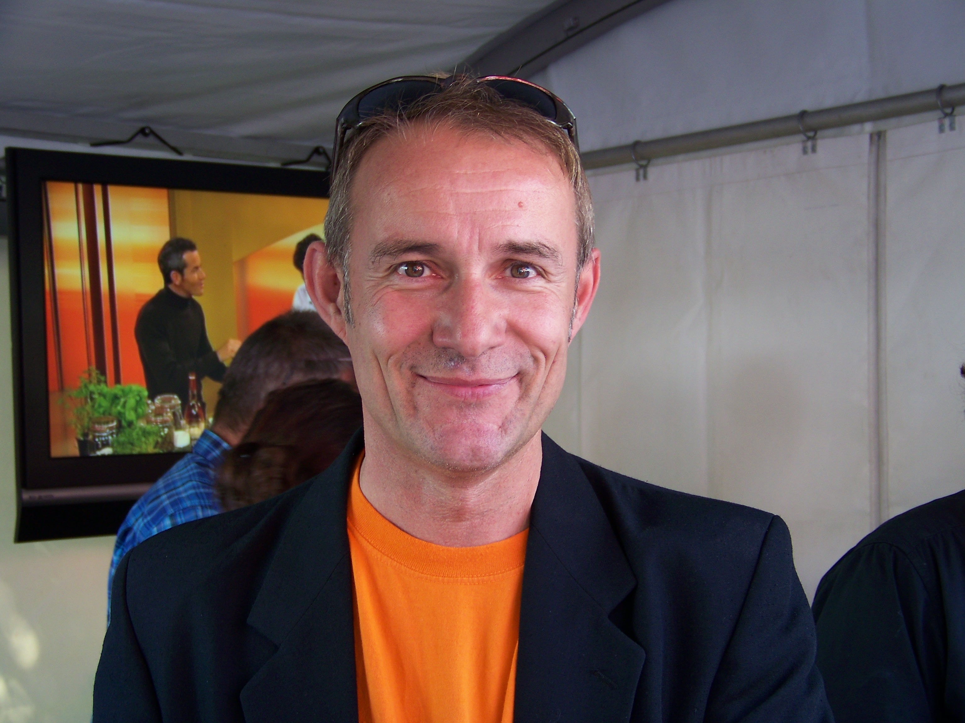 Andreas Ulrich - rbb Studios Berlin